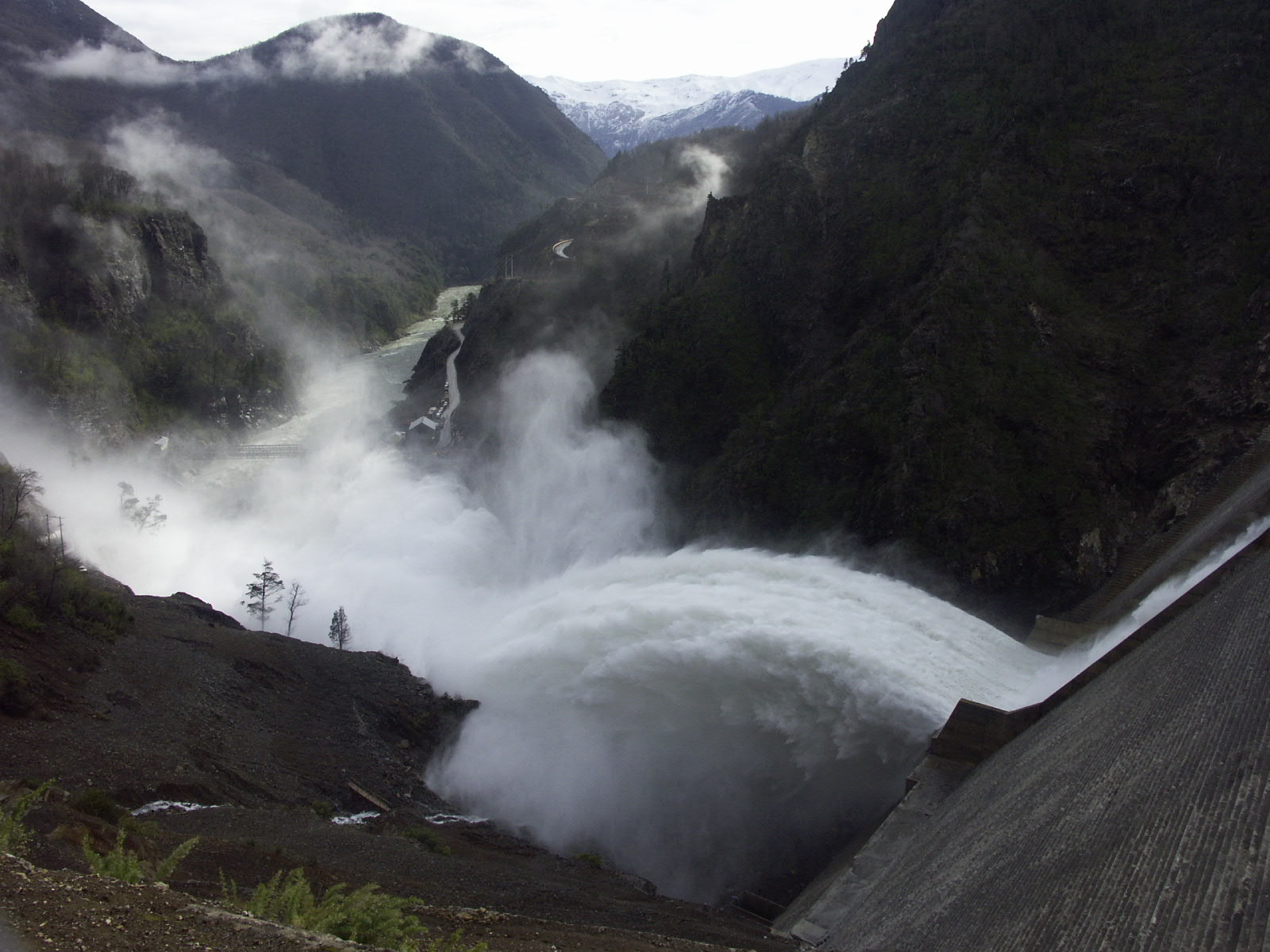 Vertedero Ralco y río Biobío